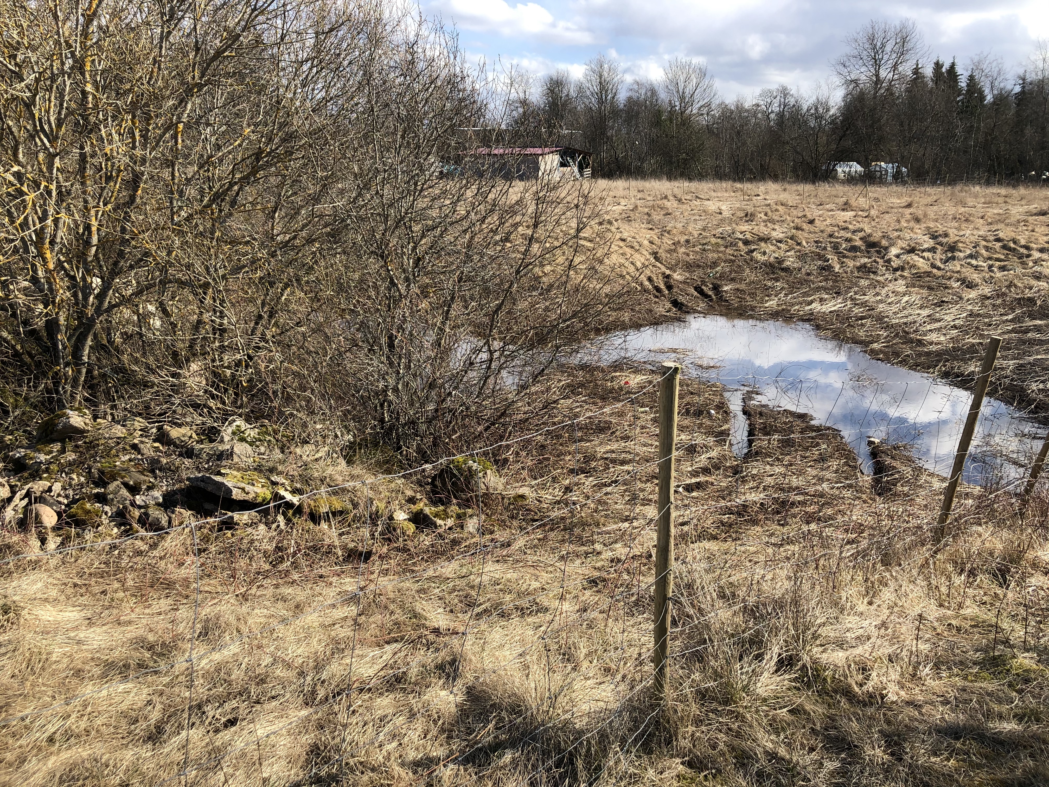 Kurisutes neeldub vesi maa alla, Kurevere